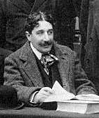 Alain (Émile-Auguste Chartier), professeur de philosophie vers 1914 au lycée Henri IV (Paris, 5e arrond.). Détail d'une photo de classe.